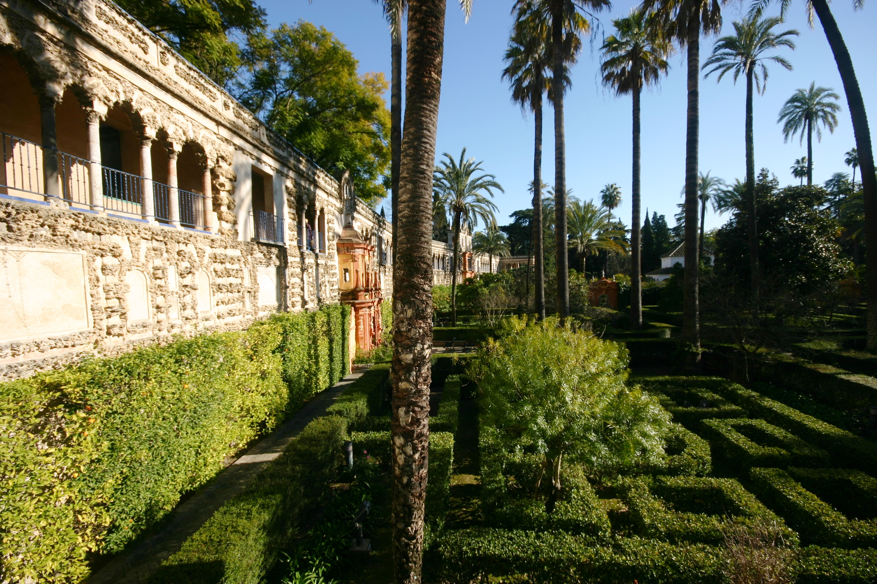 Galería de los Grutescos